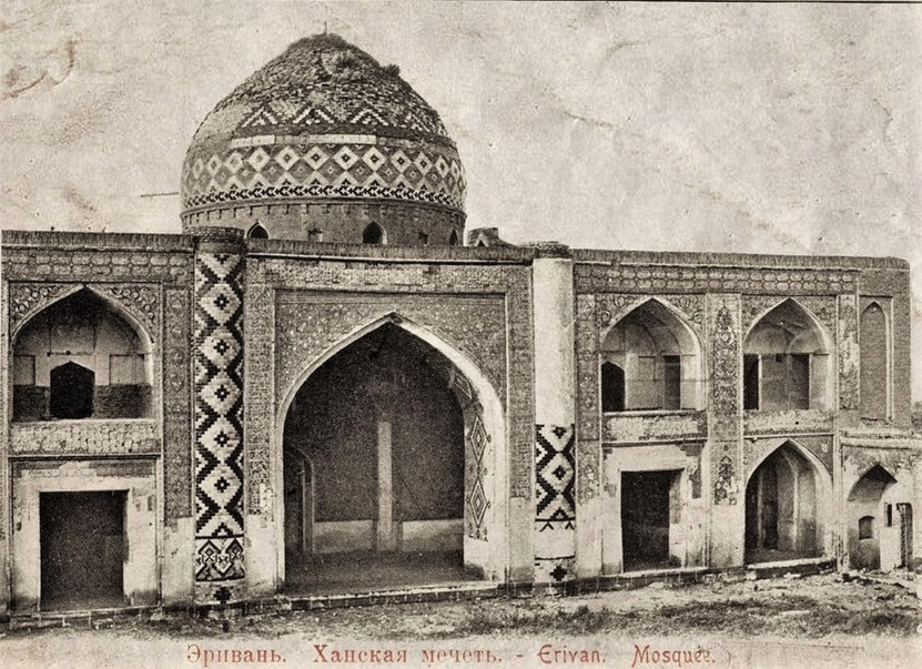 Почтовая карточка. Эривань. Ханская мечеть, 1917.